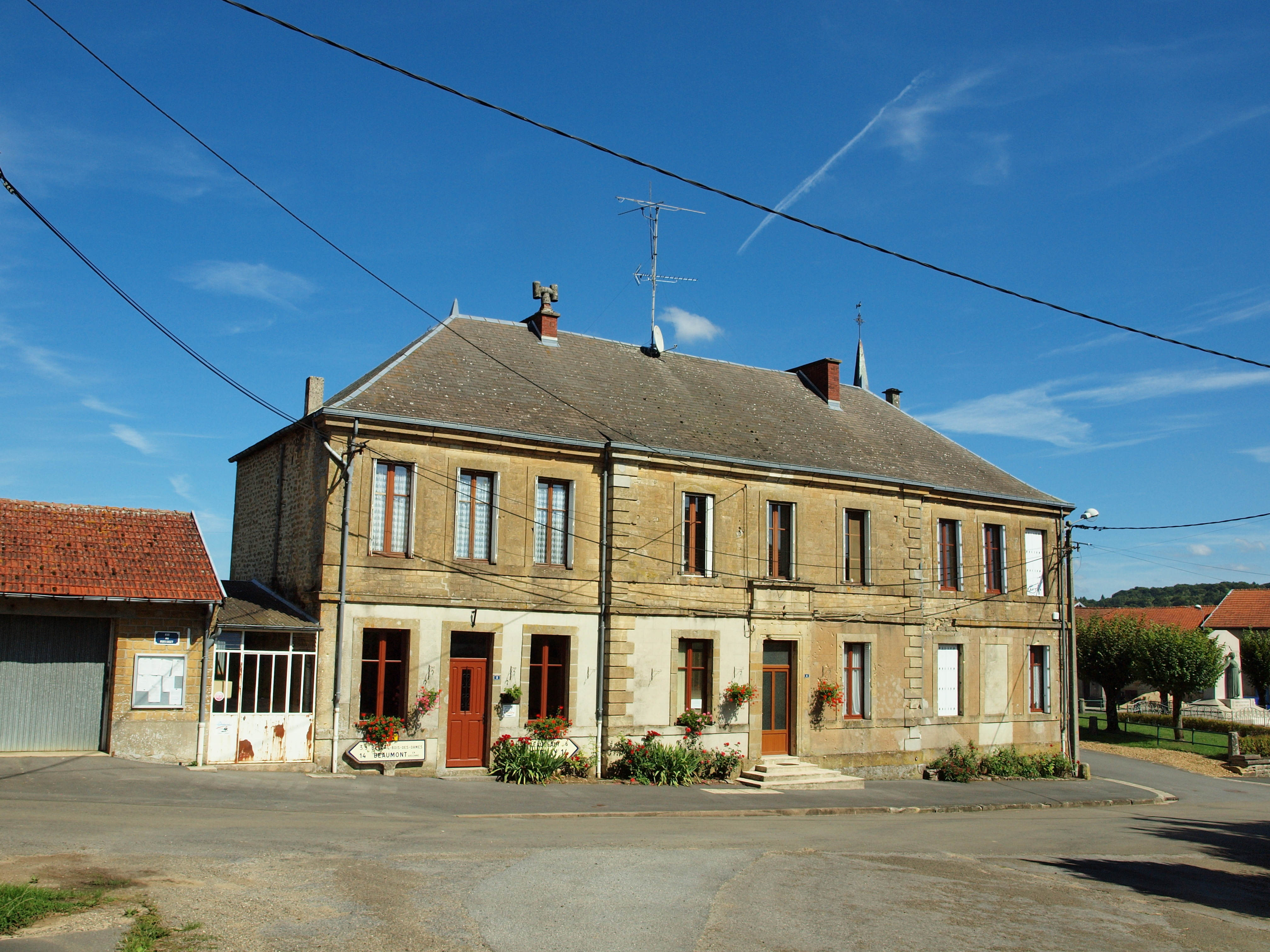 Nouart (Ardennes, France)